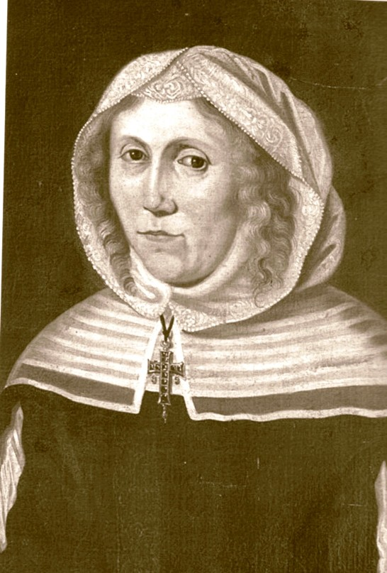 Ottilia von Fürstenberg (Äbtissin Kloster Oelinghausen, zeitgenössisches Gemälde aus dem 16. Jahrhundert).